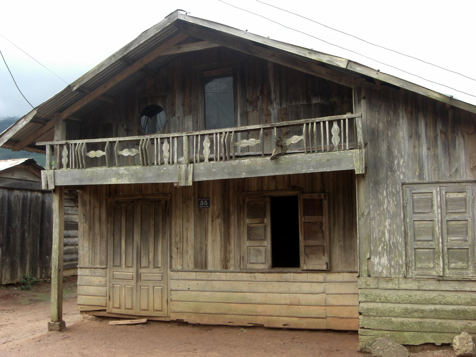 Wooden house Vietnam